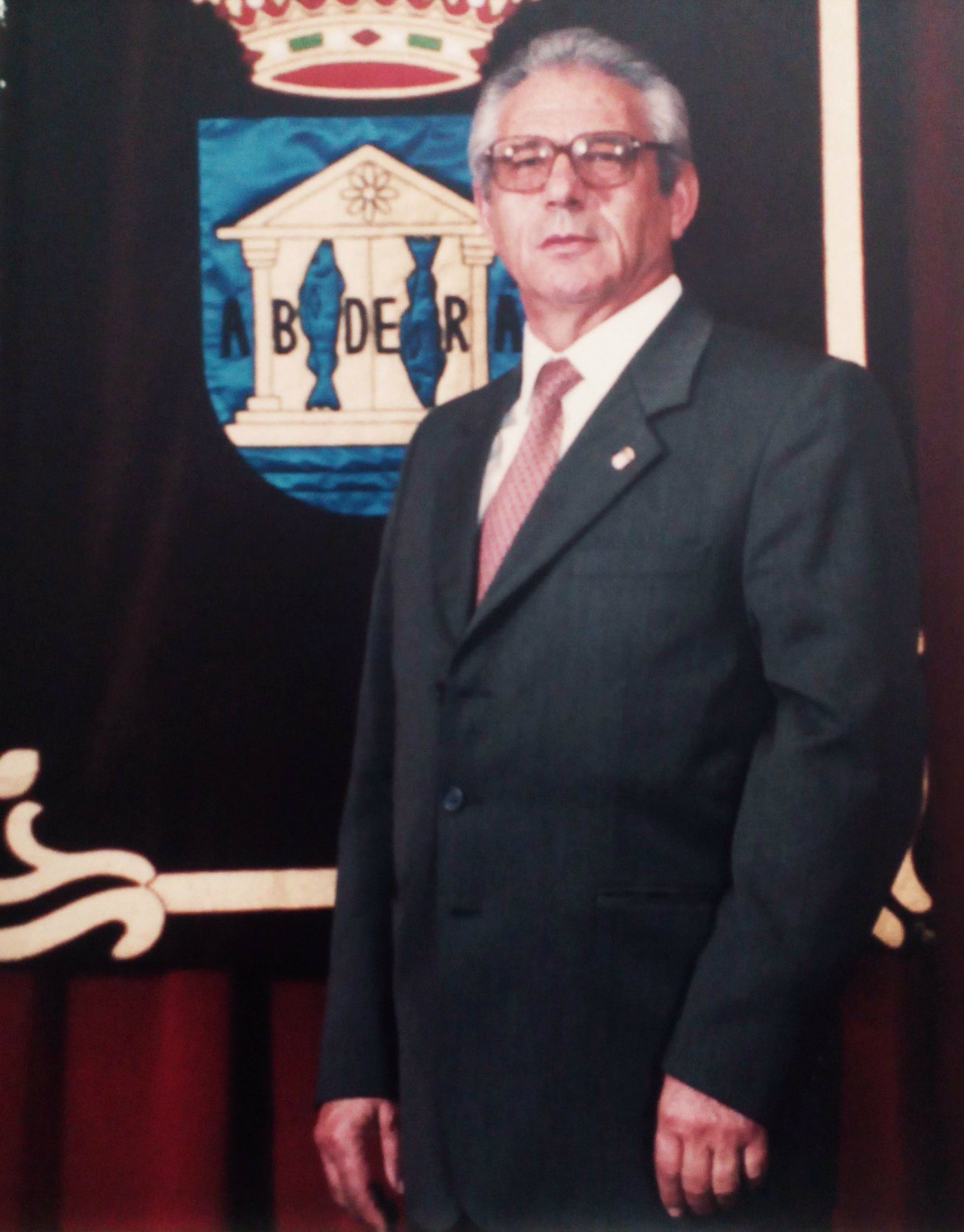 Pedro Sarmiento, primer Alcalde de la Democracia en Adra y Parlamentario en el Parlamento de Andalucía.